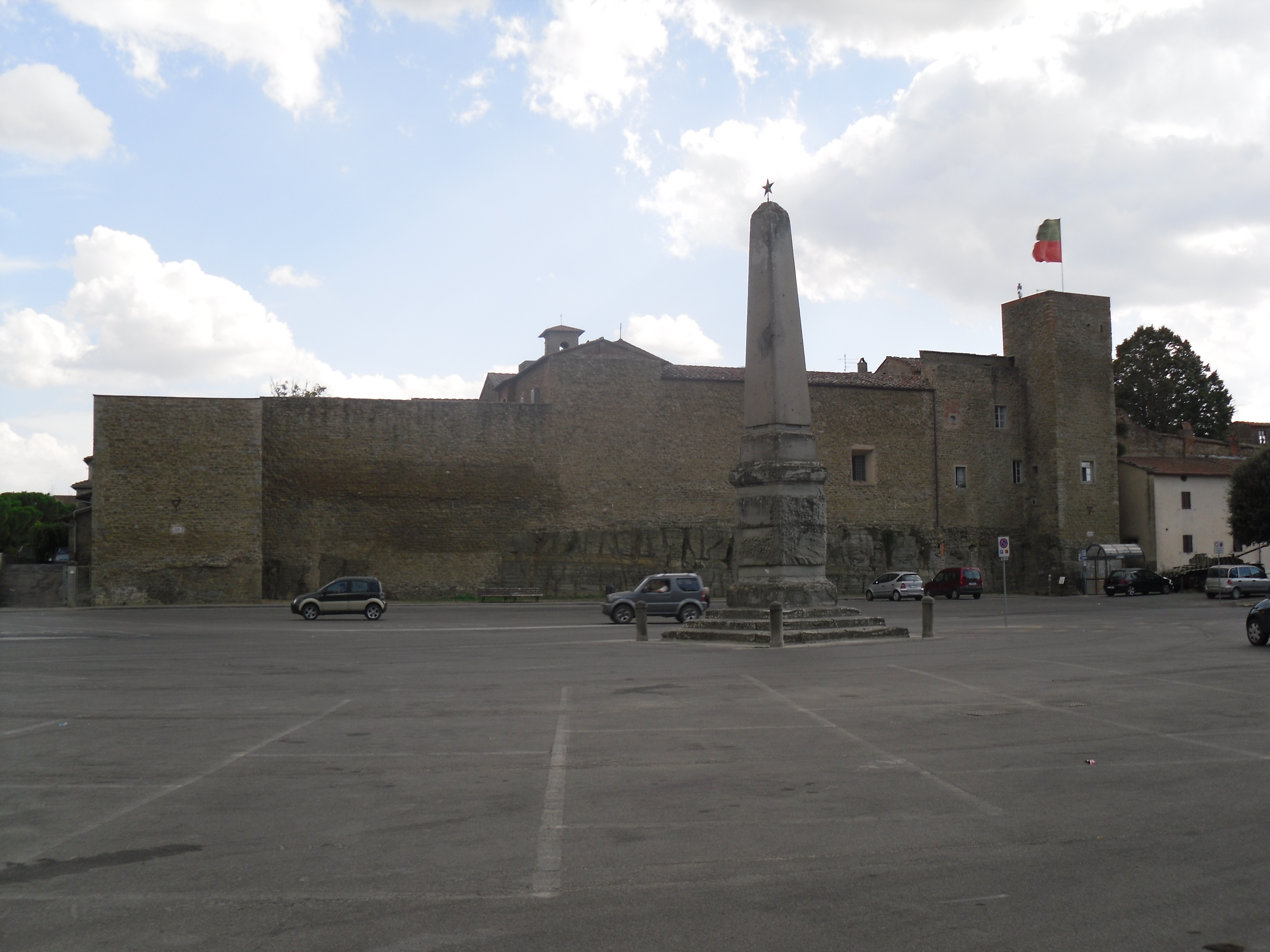 Piazzale Garibaldi (o "Parterre"), Castiglion Fiorentino, Arezzo, Italia